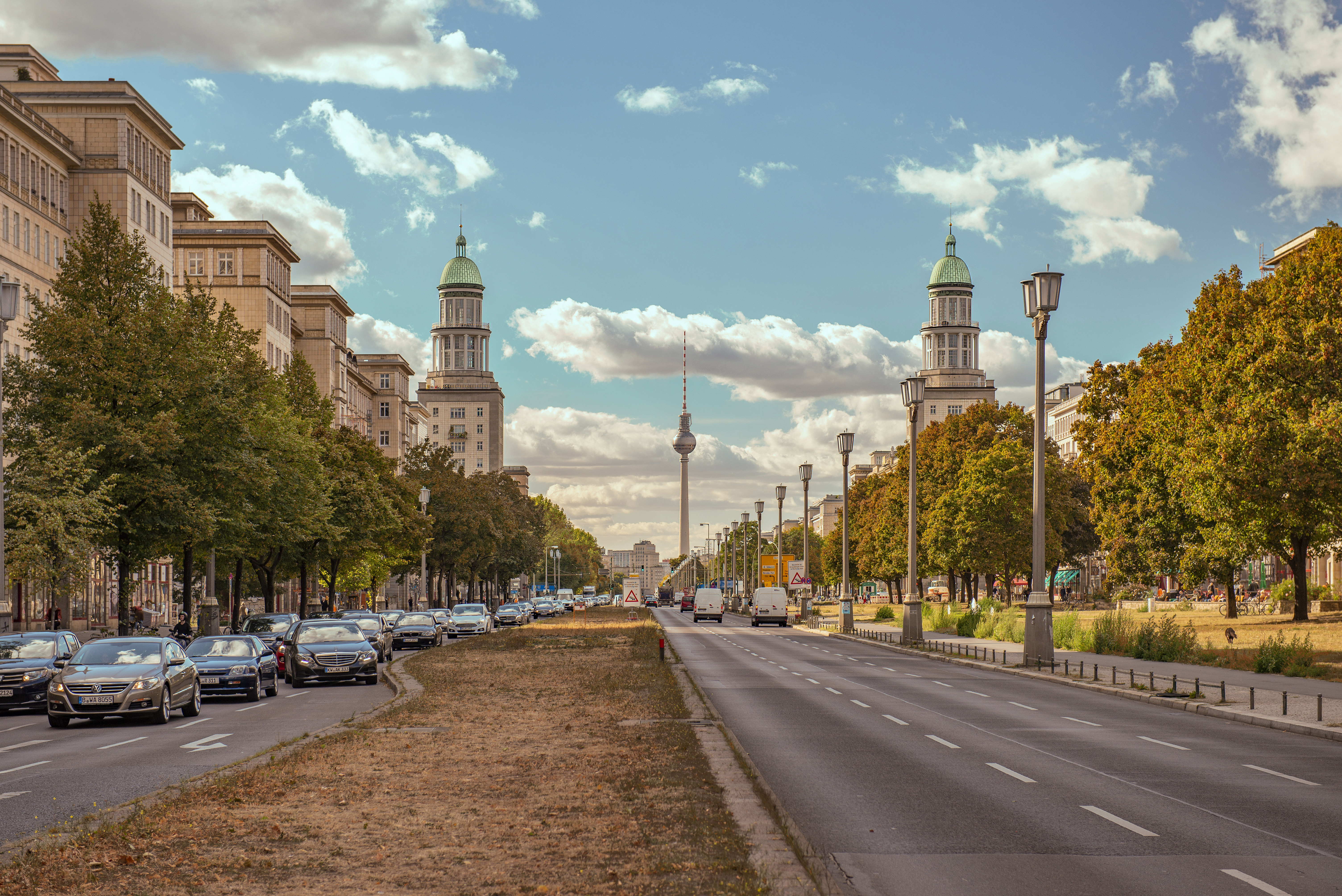 Blick in die Karl-Marx-Allee mit Frankfurter Tor